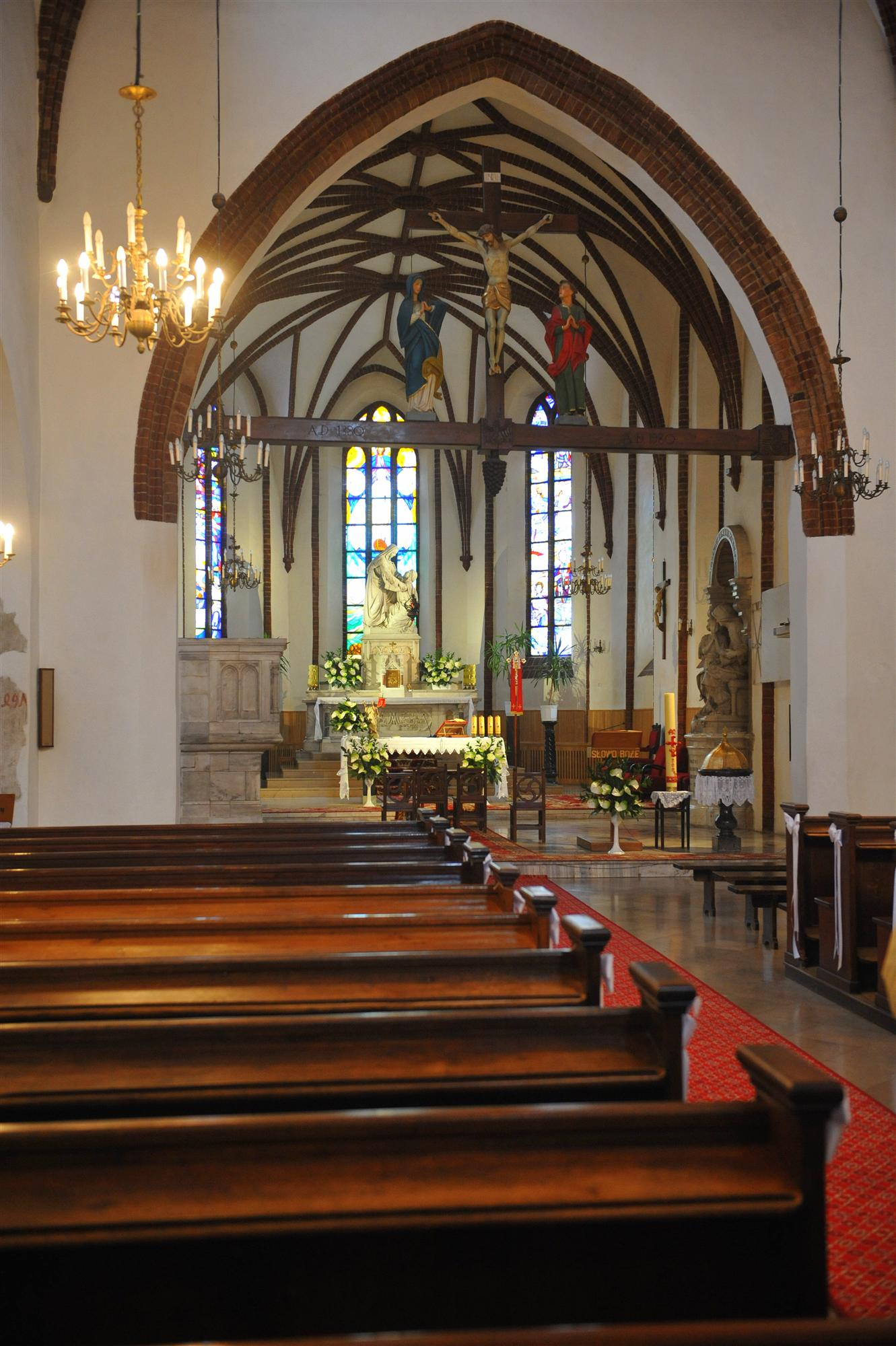 Wnętrze kościoła Nawiedzenia NMP w Warszawie